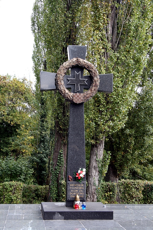 Spomenik hrvatskim domobranima na zagrebačkom Mirogoju